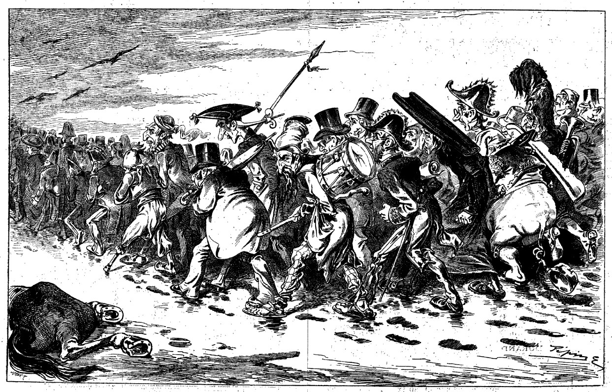 La Grande Retraite de 1877. Caricature de Pépin, dans l'édition du 30 décembre 1877 du Grelot. L'échec des monarchistes y est caricaturé en débâcle napoléonienne.